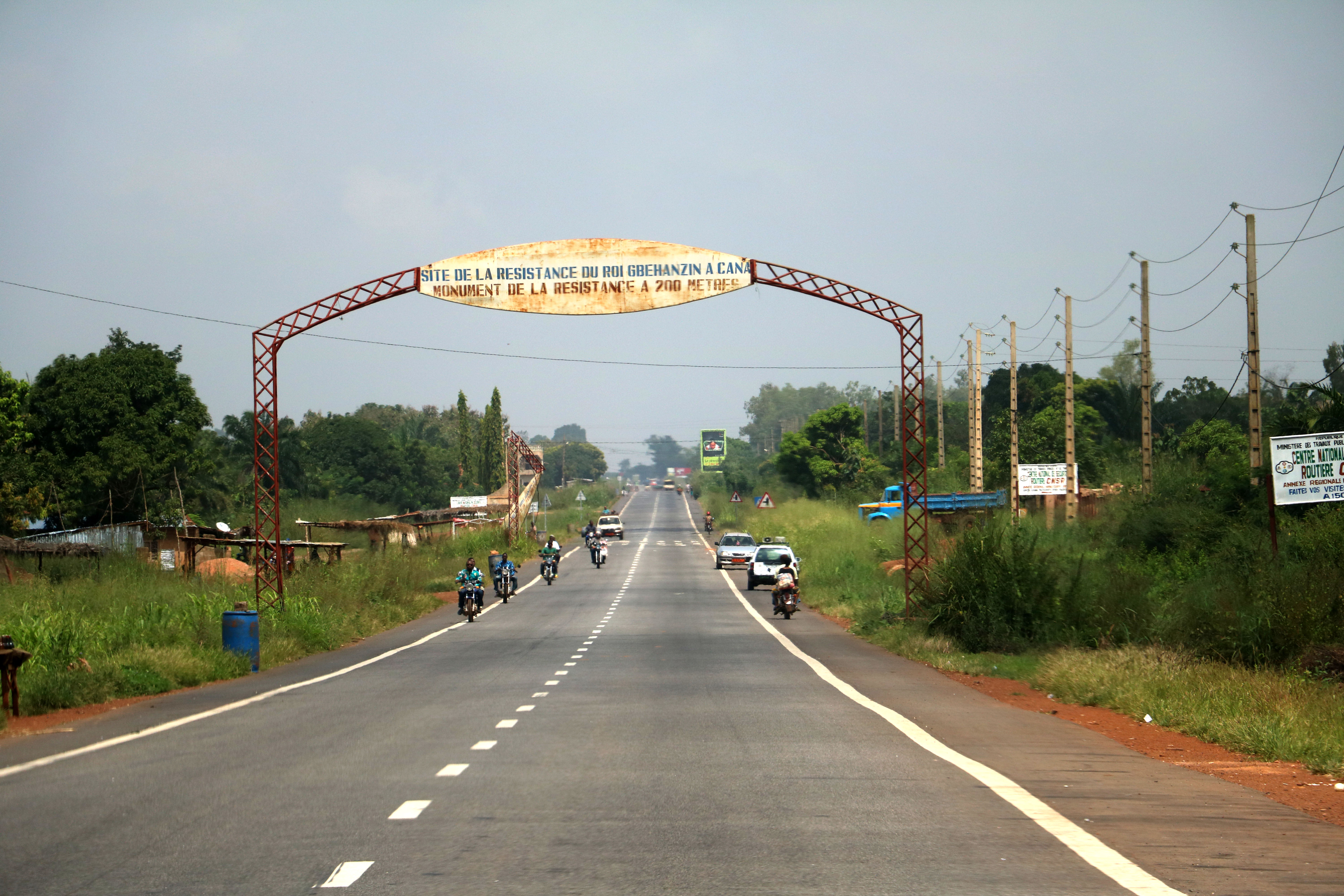 the construction of a new road leaves the place of resistance of the king béhanzin This is an image with the theme "Africa on the Move or Transport" from: Benin